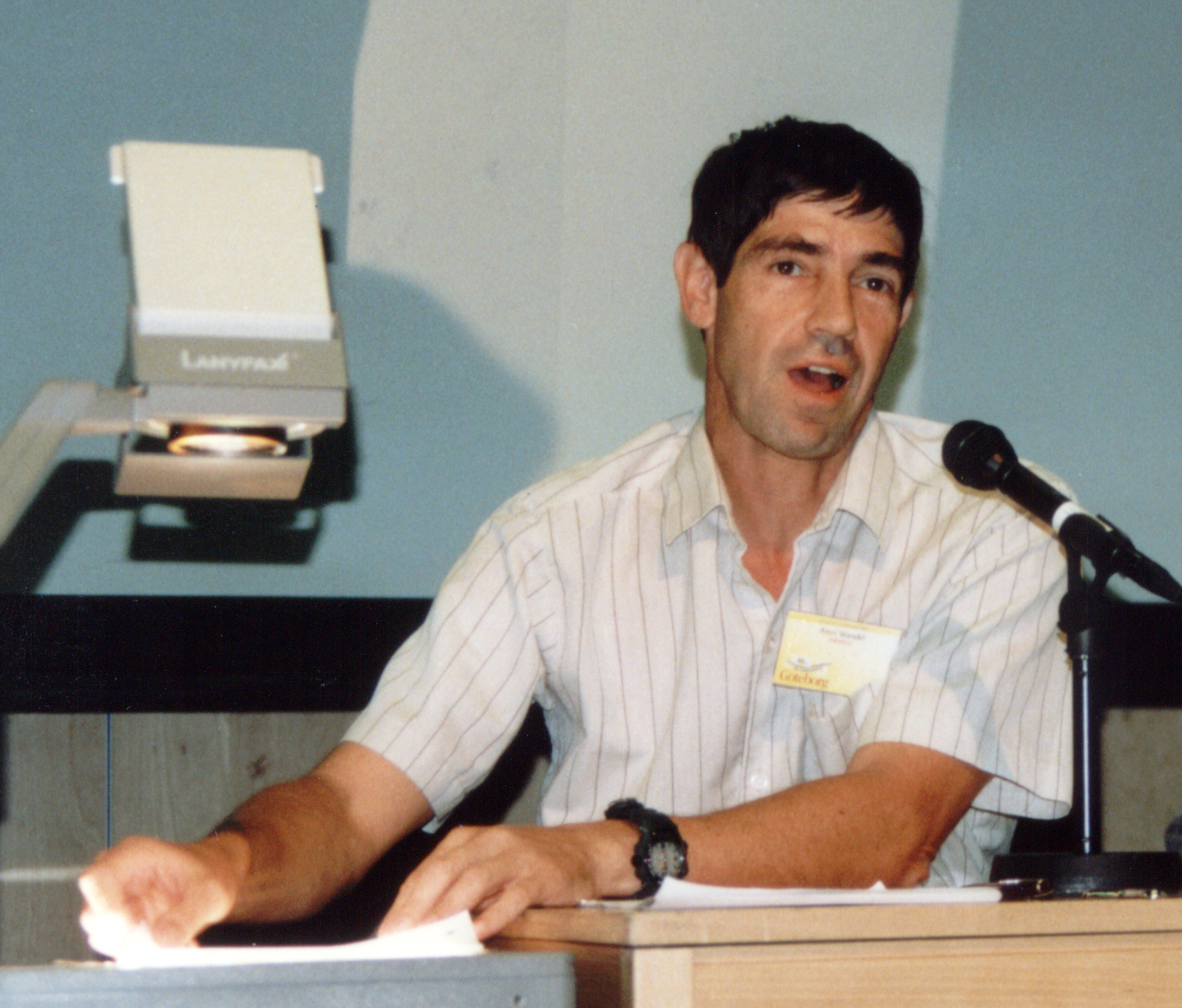 Universala Kongreso de Esperanto, Gotenburgo 2003. Amri Wandel.